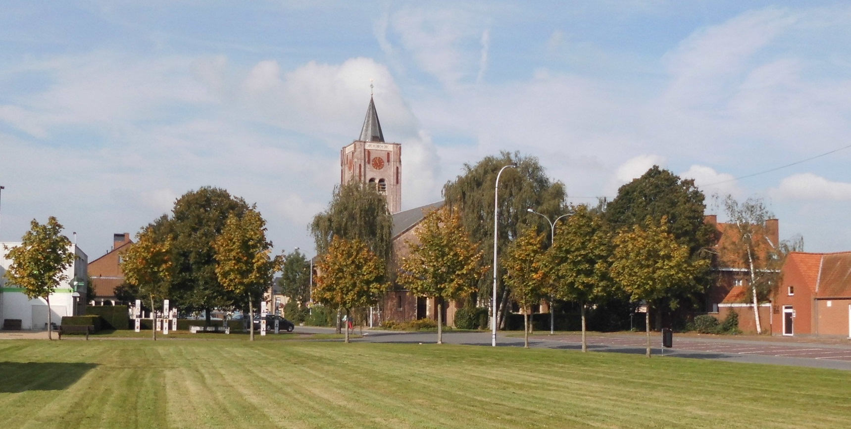 Parochiekerk Sint-Eligius - Kerkplein - Sint-Eloois-Winkel - Ledegem - West-Vlaanderen - België